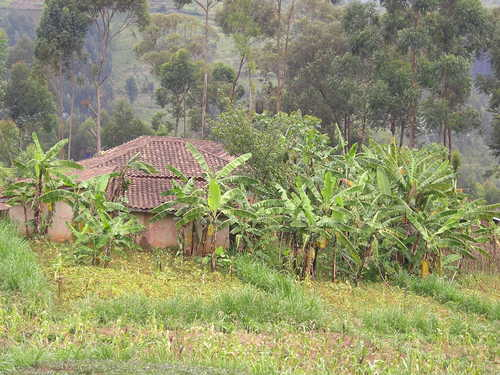 tipica abitazione rurale della zona di Gatare - Rwanda